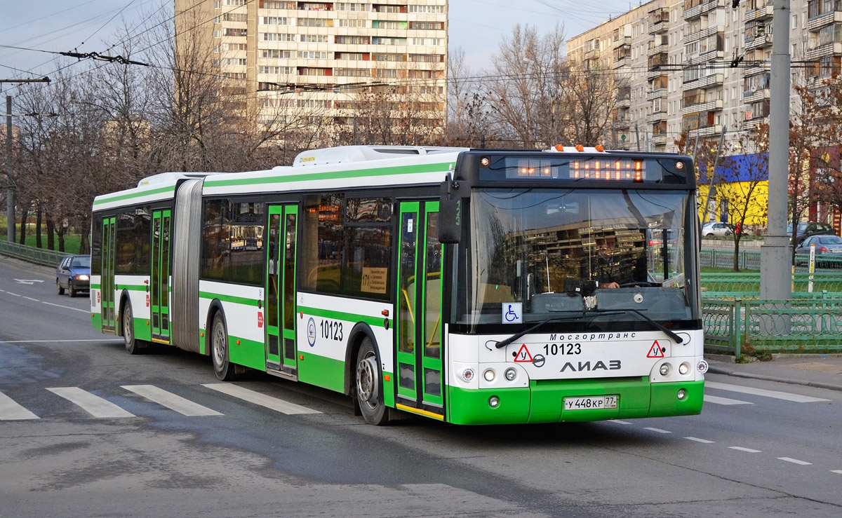 Хабаровская улица, маршрут №171